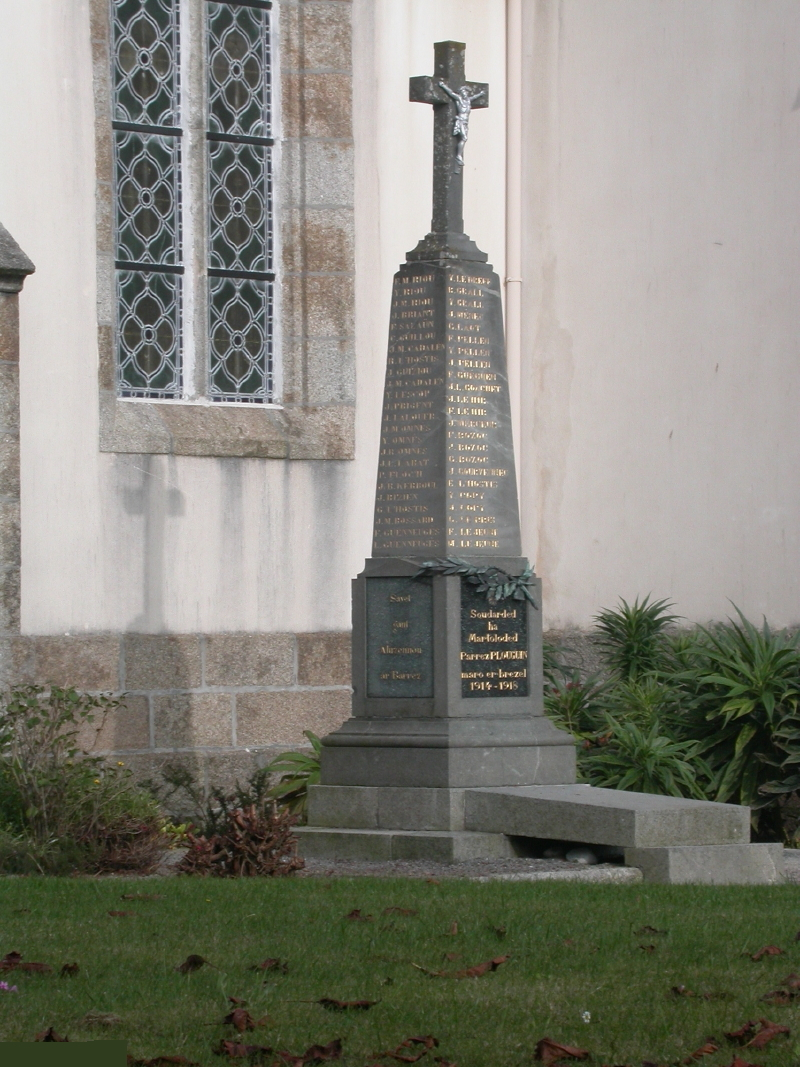 Monument aux morts - Plouguin-29